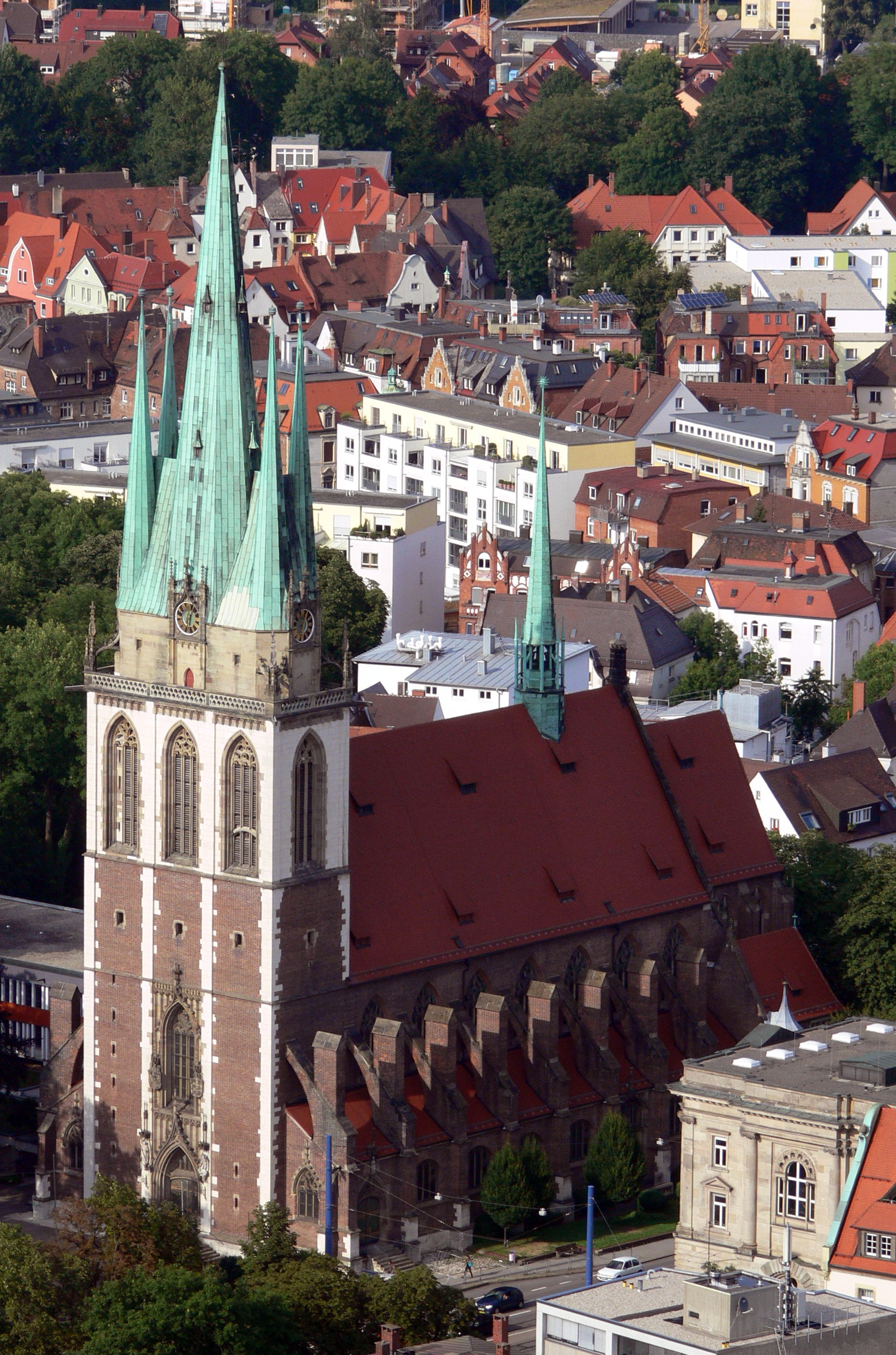 Pfarrkirche St. Georg in Ulm, fotografiert vom Ulmer Münster